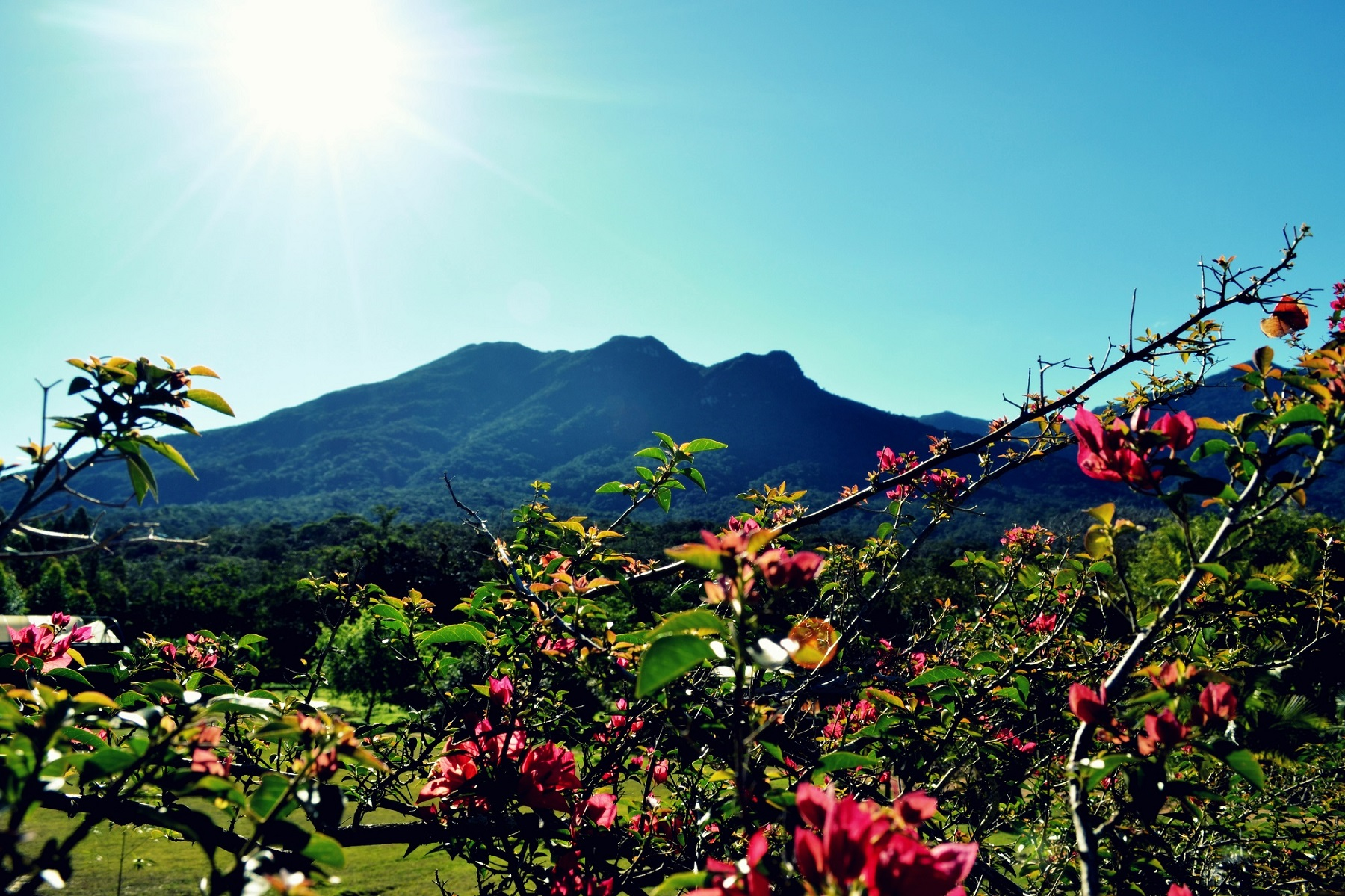 Monte Crista é uma montanha em plena Serra do Mar, com 920 metros de altura. Localizada no município de Garuva, atraindo milhares de turistas atrás de lazer, aventuras e seus mitos que se proliferaram acerca das suas cavernas e escadarias. Esta calçada de pedras ficou conhecida como “Caminho dos Ambrósios”, utilizado pelo explorador espanhol Francisco Cabeça de Vaca, descobridor das Cataratas do Iguaçu. Segundo alguns historiadores, este espanhol realizou a primeira travessia por terra entre São Francisco do Sul até Assunção, capital do Paraguai no século XVI. Muitos já falaram e escreveram sobre este monte e seus mistérios.